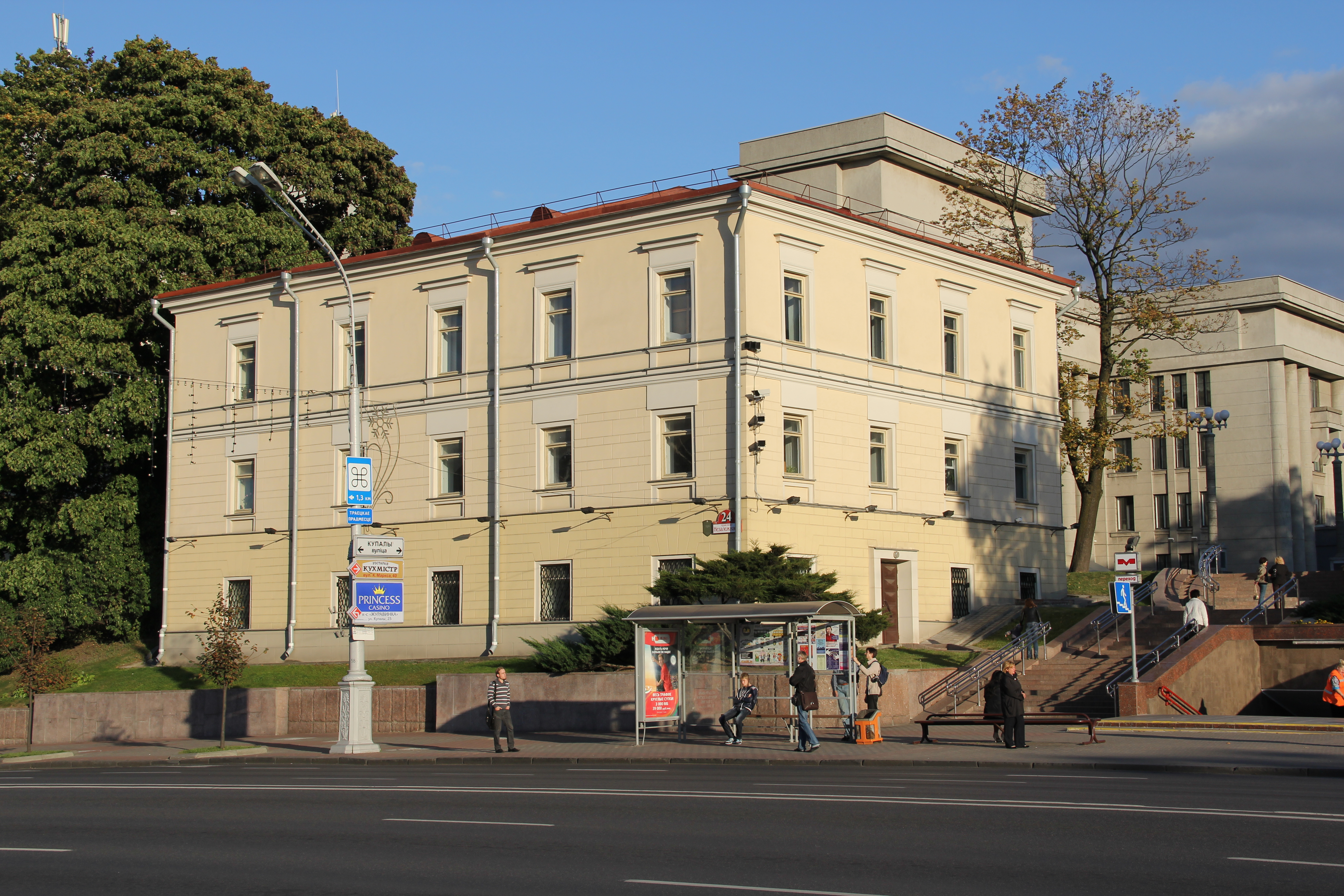 Беларуская (тарашкевіца): Будынак былой духоўнай кансысторыі. г. Менск This is a photo of Belarusian heritage monument. Reference number: 712Г000172 ( WLM)